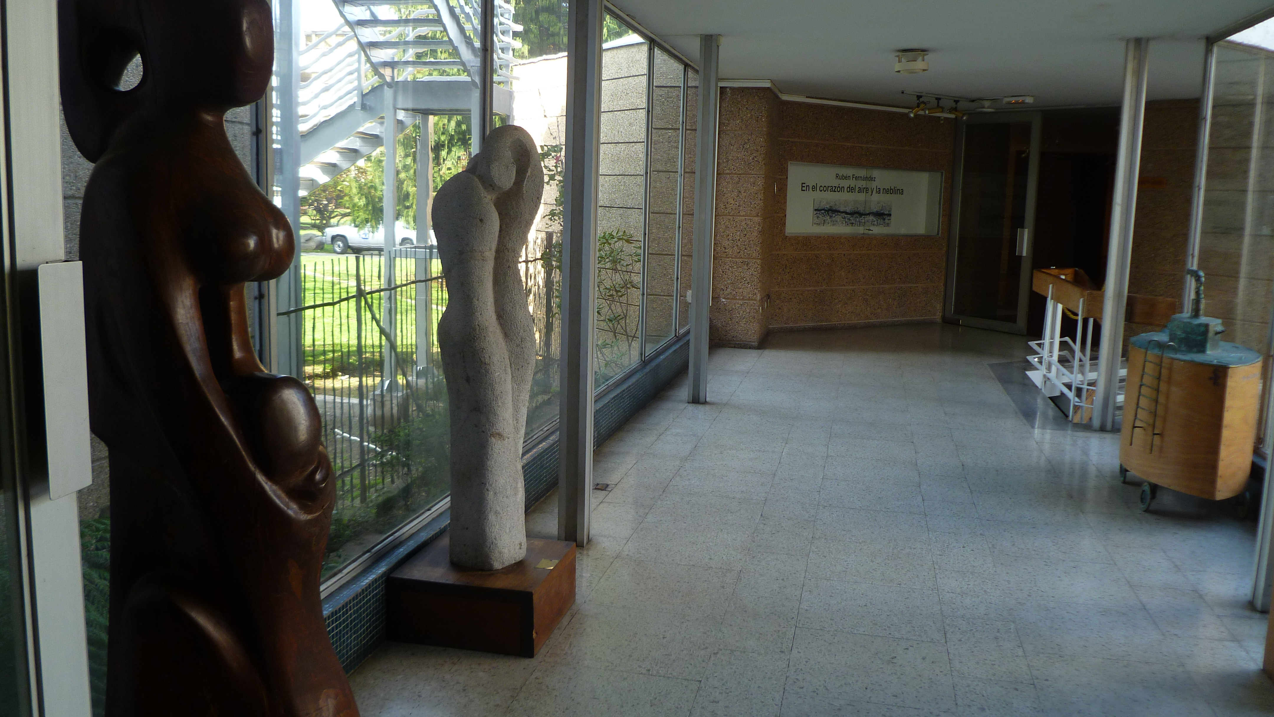 casa del arte pasillo, udec